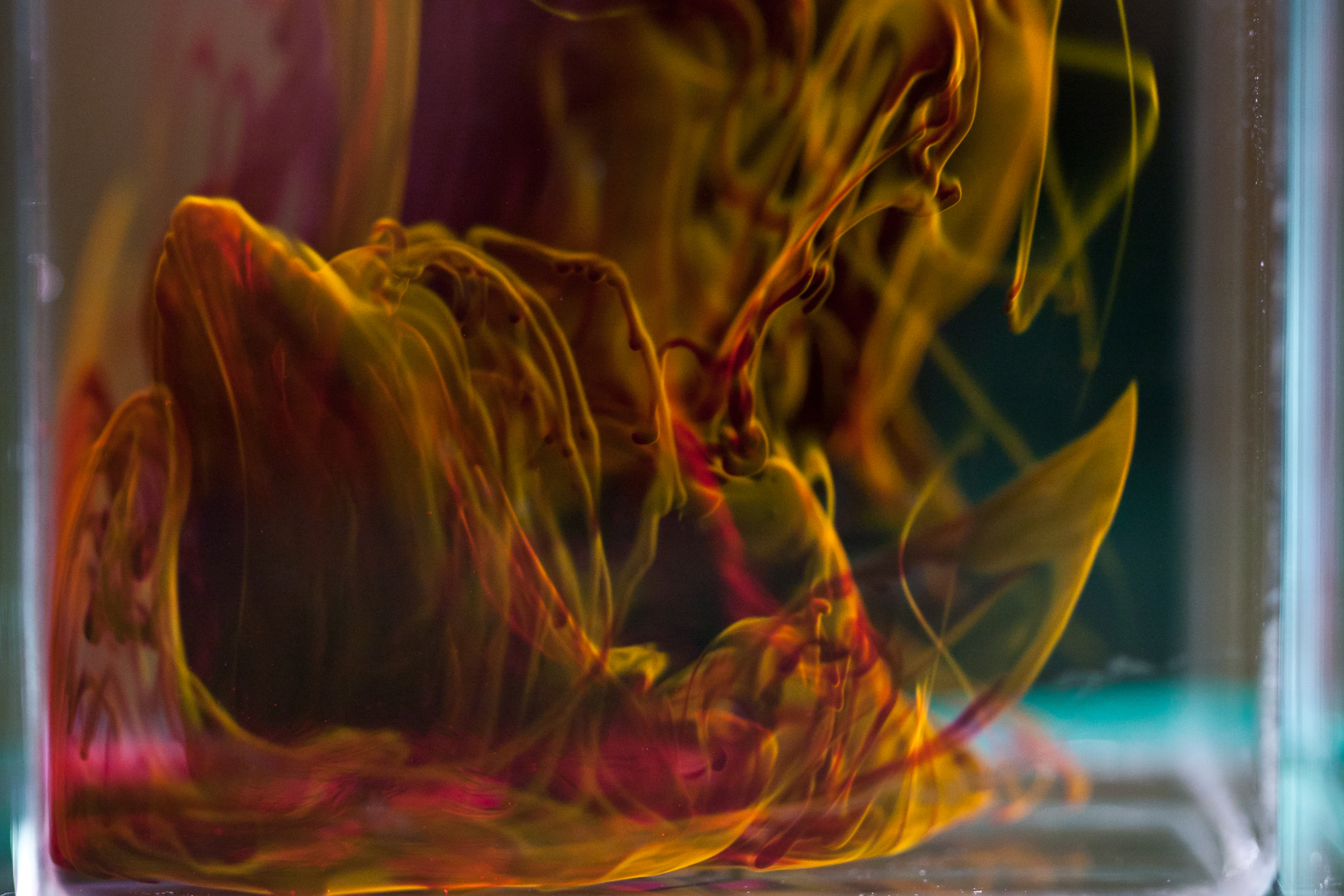 Rodamiin on teaduses laialdaselt kasutatav fluorestseeruv värvaine. Rodamiini vesilahuse loomulik värvus on küll punakasroosa, kuid paremalt langev tugev valgus ergastab rodamiini molekule ning tekkiva fluorestsentskiirguse spektri maksimum paikneb kollakasoranži värvuse piirkonnas. Lisaks tasub tähele panna niitjaid struktuure, mis tekivad erinevate tihedustega vedelike segunemisel (Rayleigh–Taylori ebastabiilsus), niisuguseid struktuure on täheldatud ka näiteks supernoovade jäänukites. See foto võitis Teadusfoto 2011 konkursil Tarkade Klubi / Imeline Teadus eripreemia.